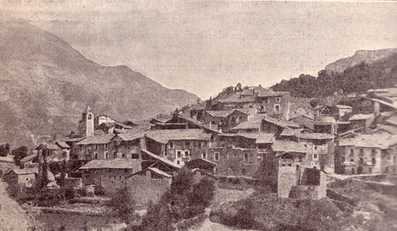 Fotografía de Mont-ros data 29 de juliol de 1891 (la Torre de Cabdella, Pallars Jussà)